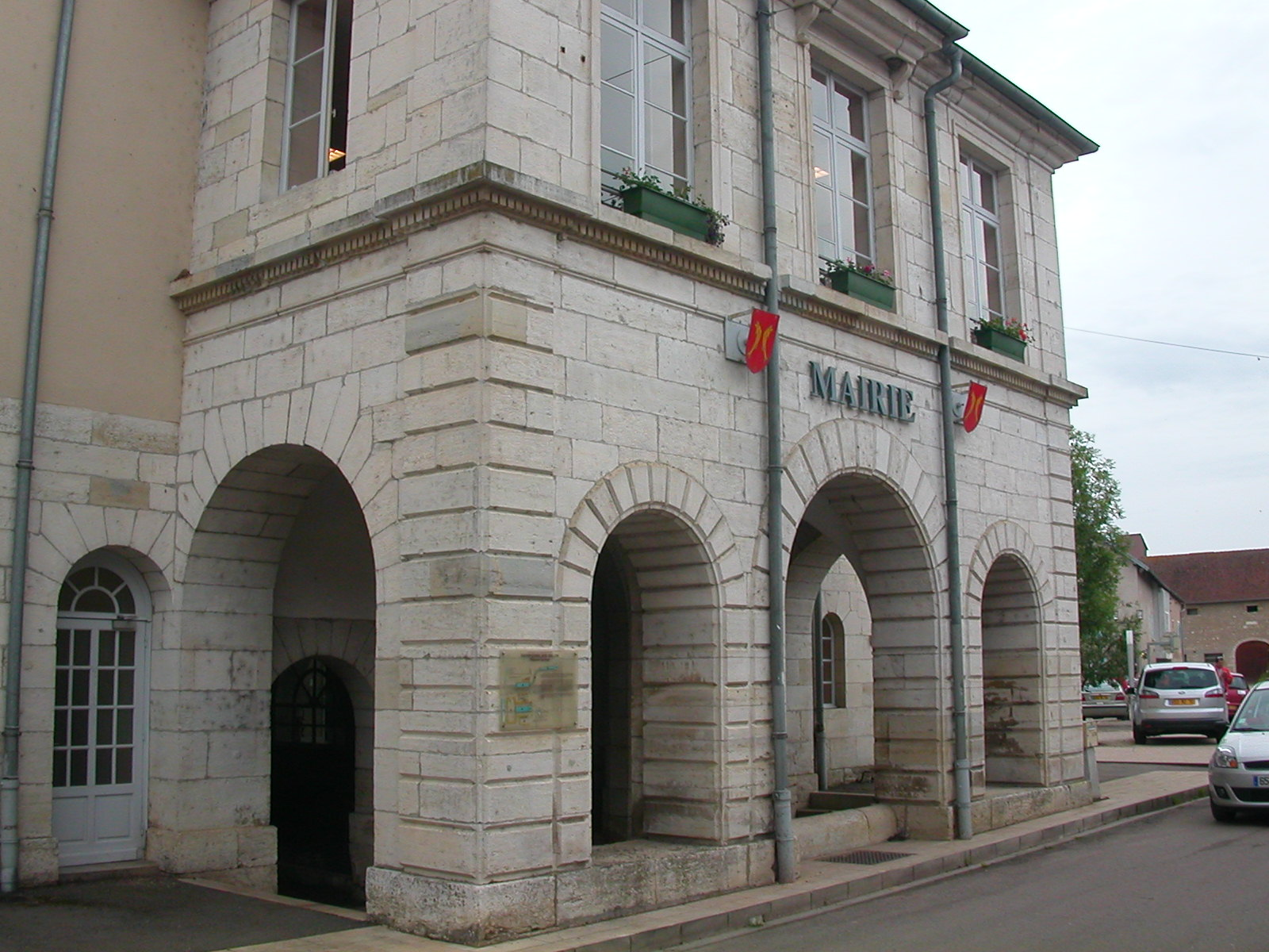 Mairie lavoir de DAMPIERRE-SUR-SALON